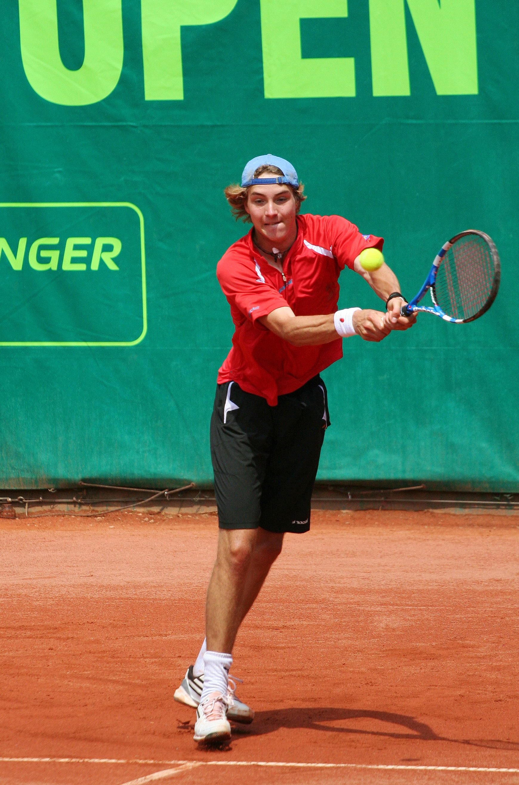 Jan-Lennard Struff v 1. kole na Košice Open 2011